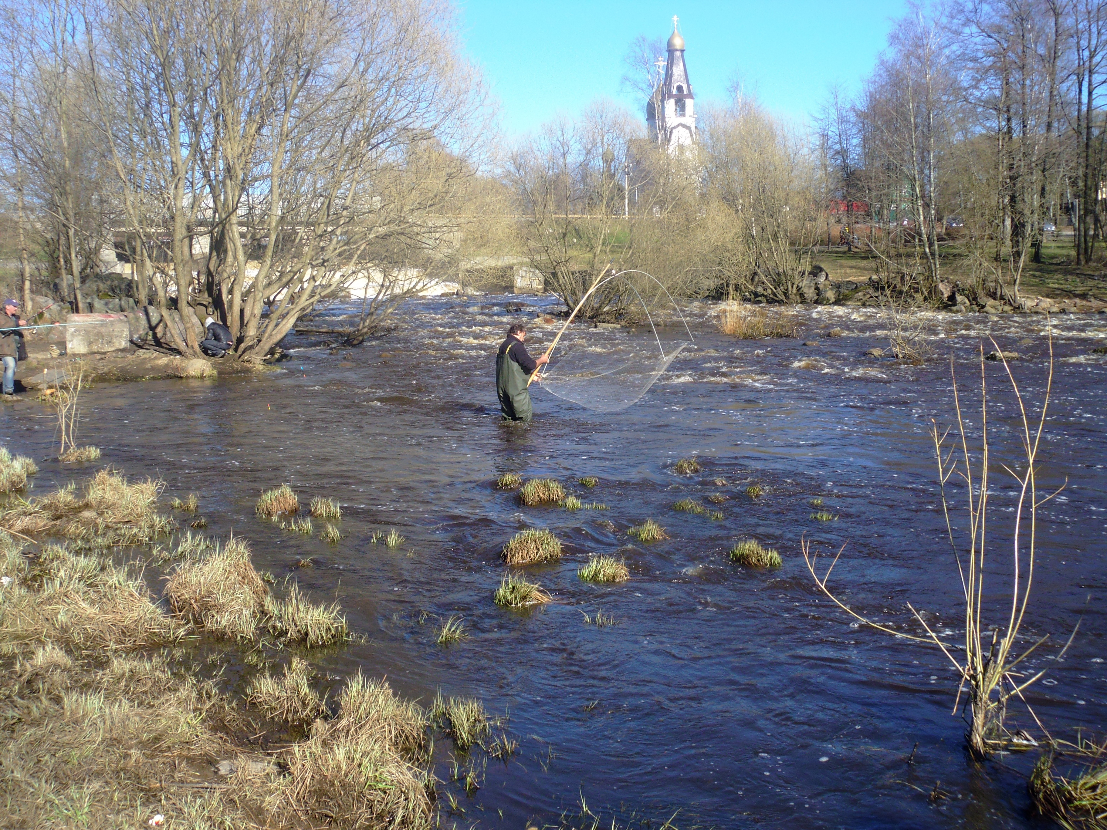 Сестрорецк СПб. Плотина Гаусмана. Лов корюшки в нижнем бъефе плотины